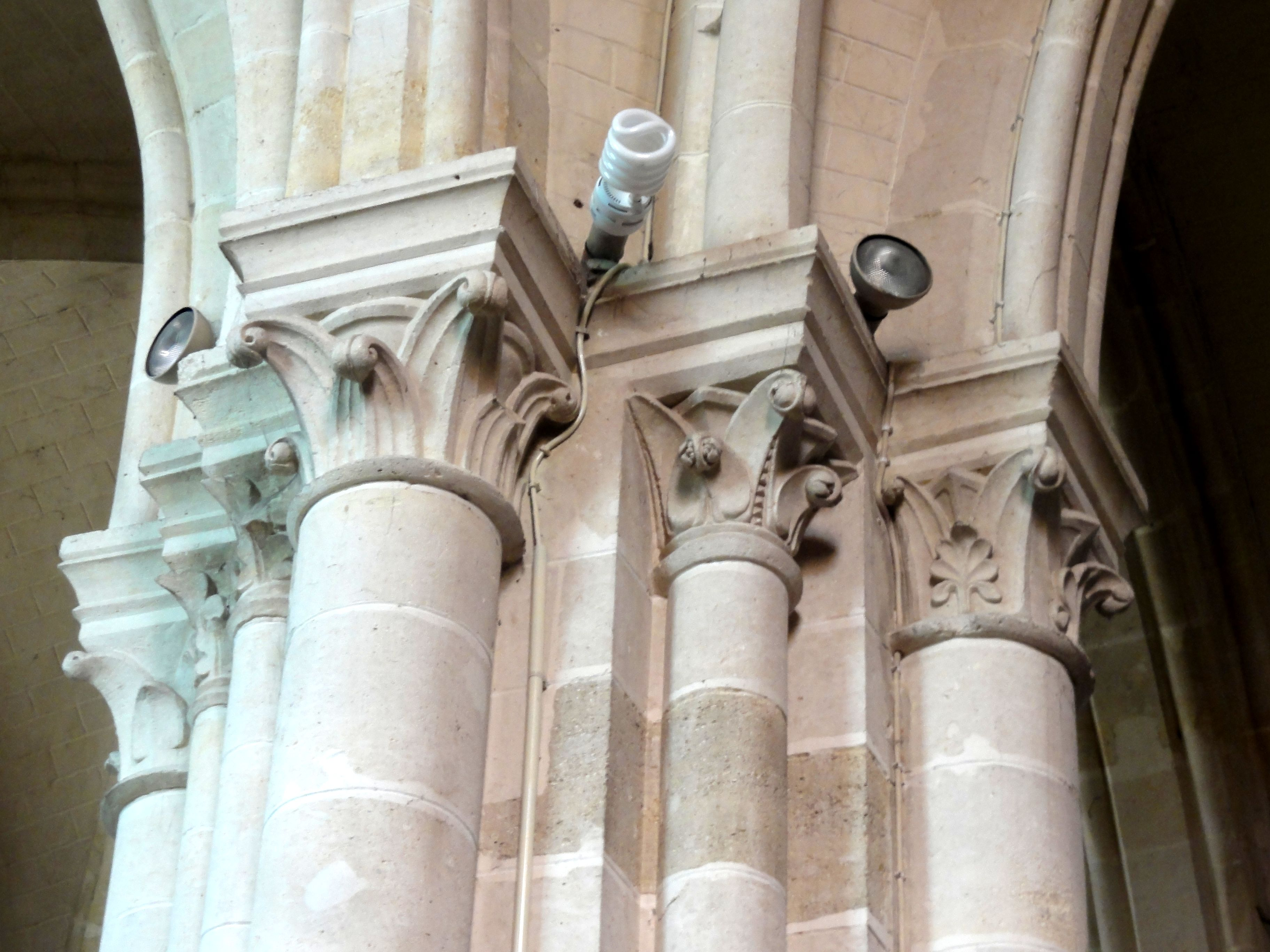 Première travée du chœur, chapiteaux du pilier nord-ouest.